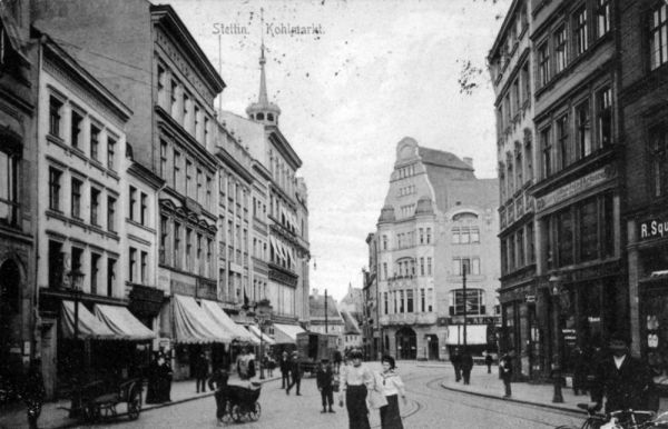 Fotografia dawnego Rynku Węglowego w Szczecinie